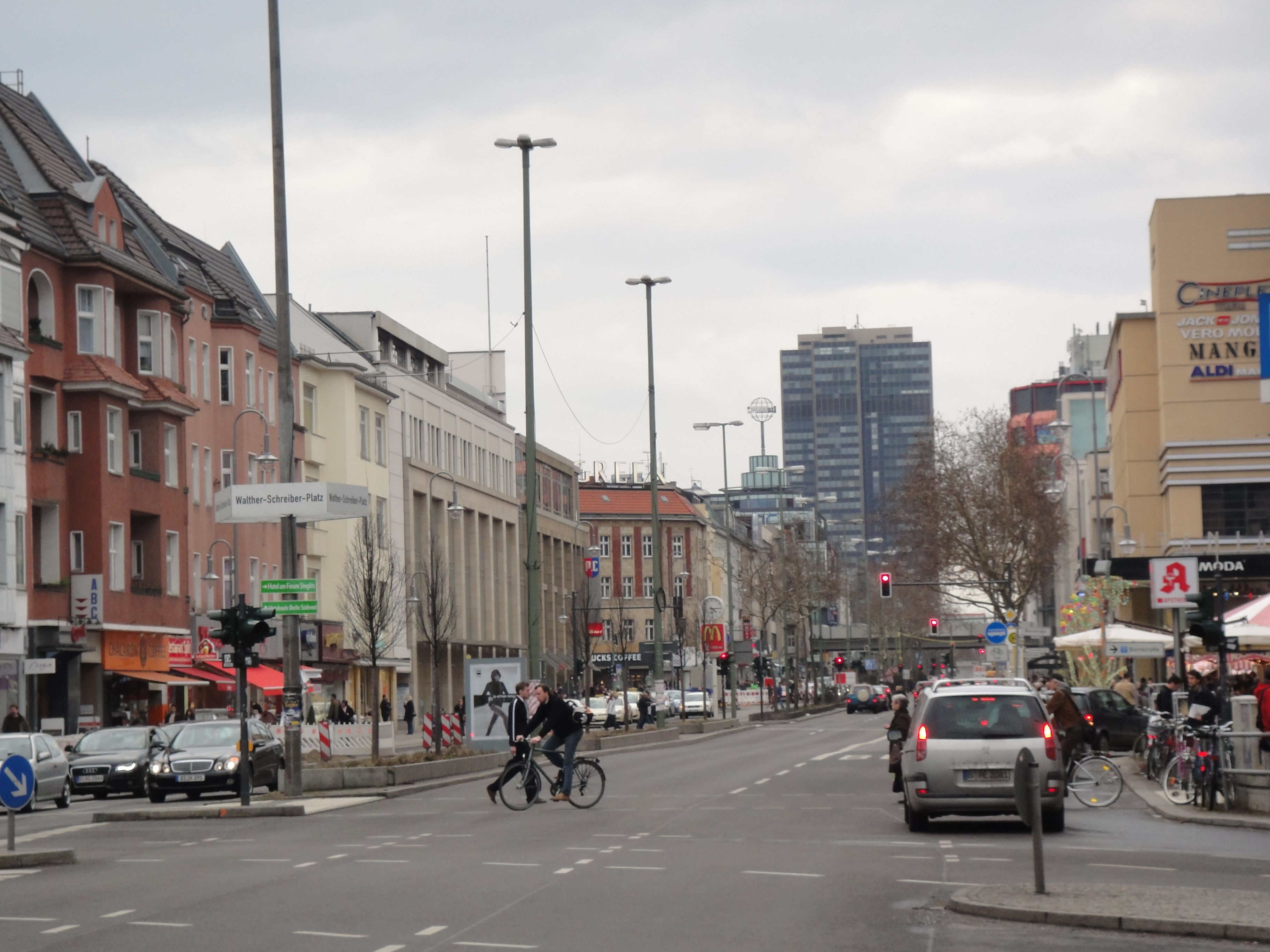 Schloßstraße in Berlin-Steglitz, Blick vom Walther-Schreiber-Platz nach Süden; im Hintergrund das Hochhaus "Steglitzer Kreisel"